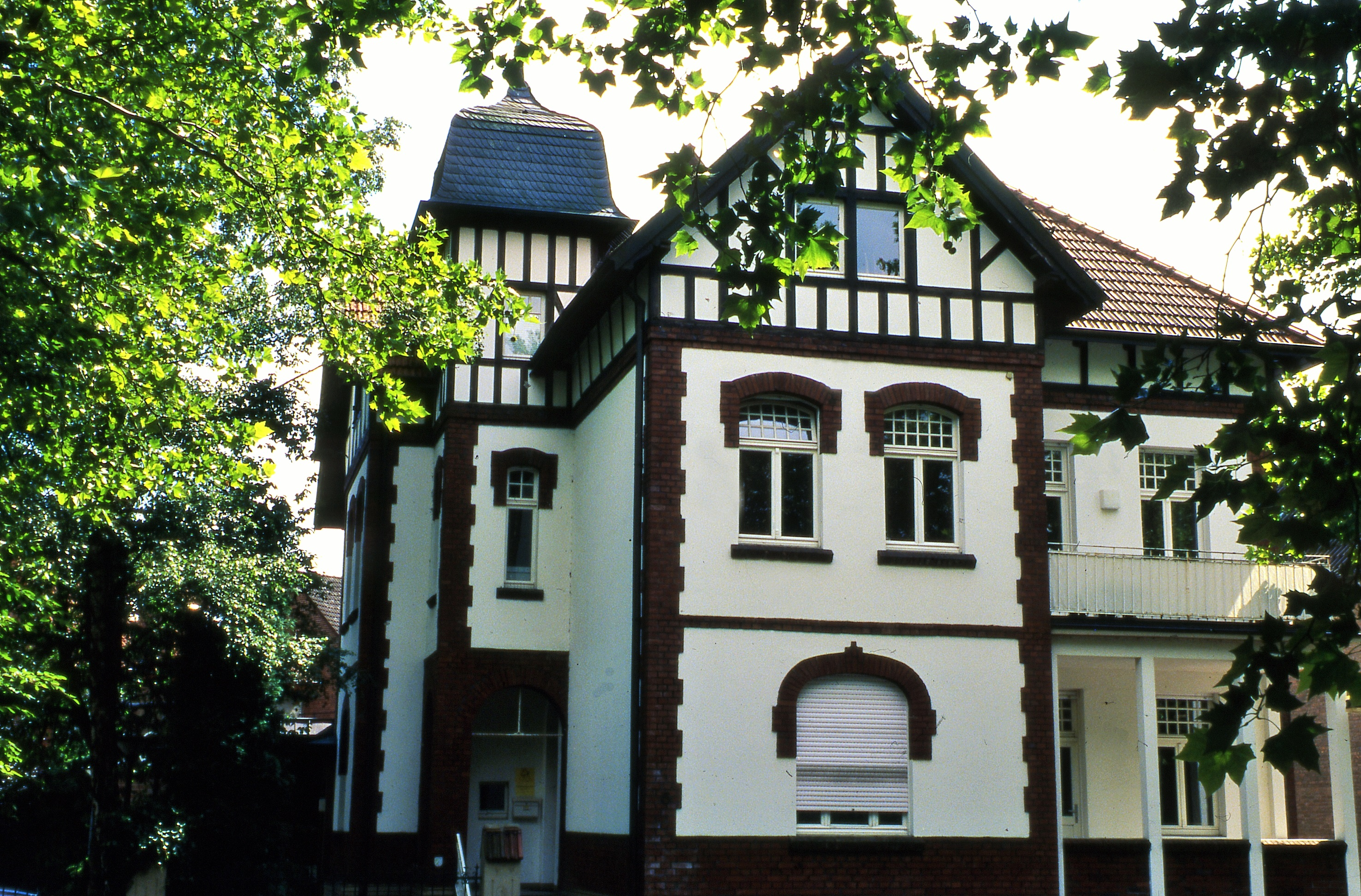 Villa Schmidt, Strontianit-Bergbauzeit, NRW Drensteinfurt, Landsbergplatz 5, Kulturdenkmal